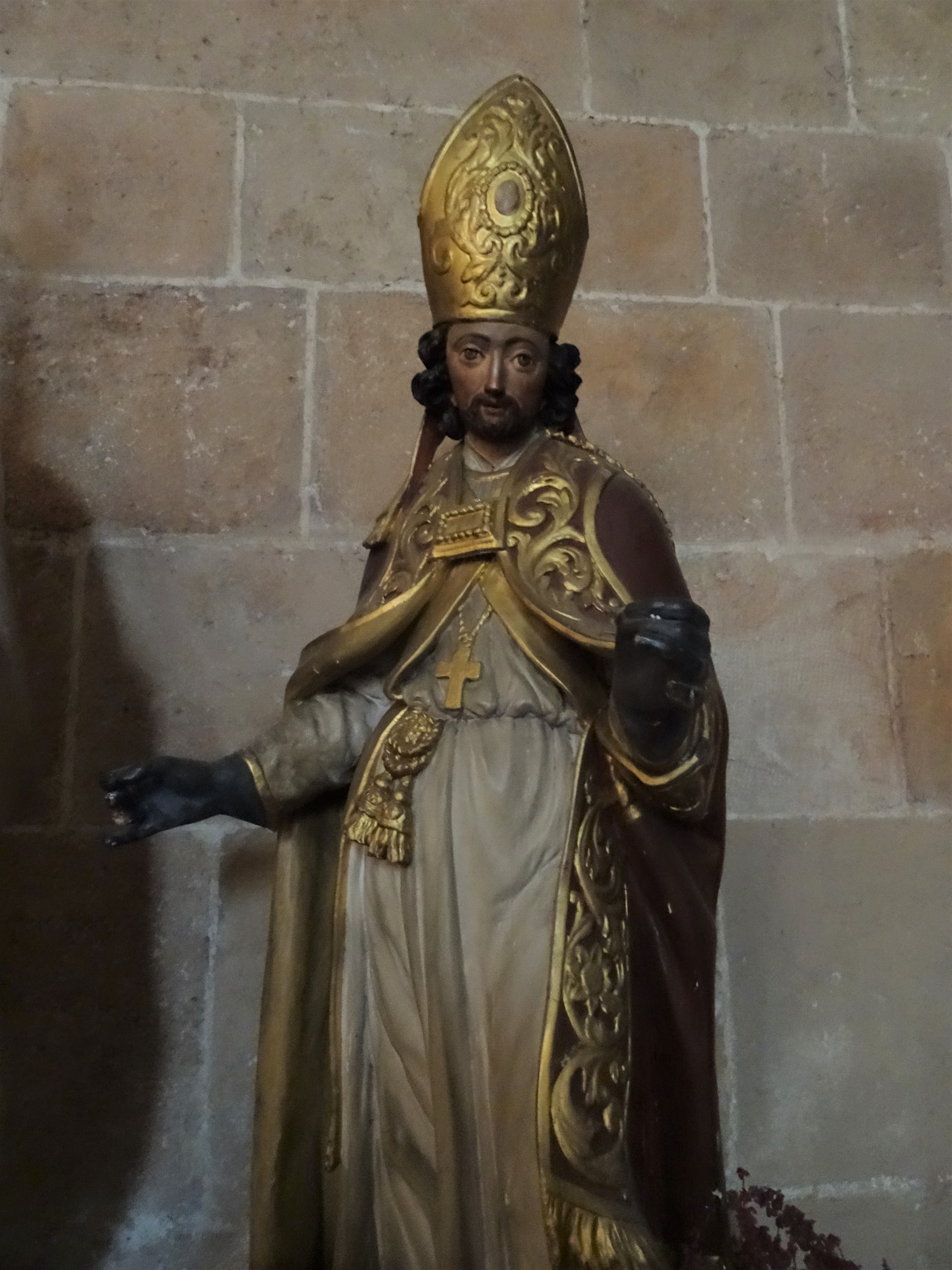 Saint Julien de Lescar, dans la cathédrale.